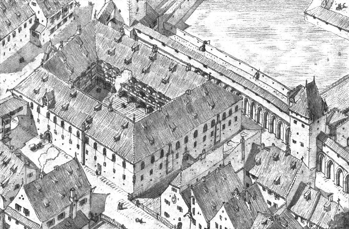 Abb. 41. Das Marstallgebäude mit dem Turnierhof.